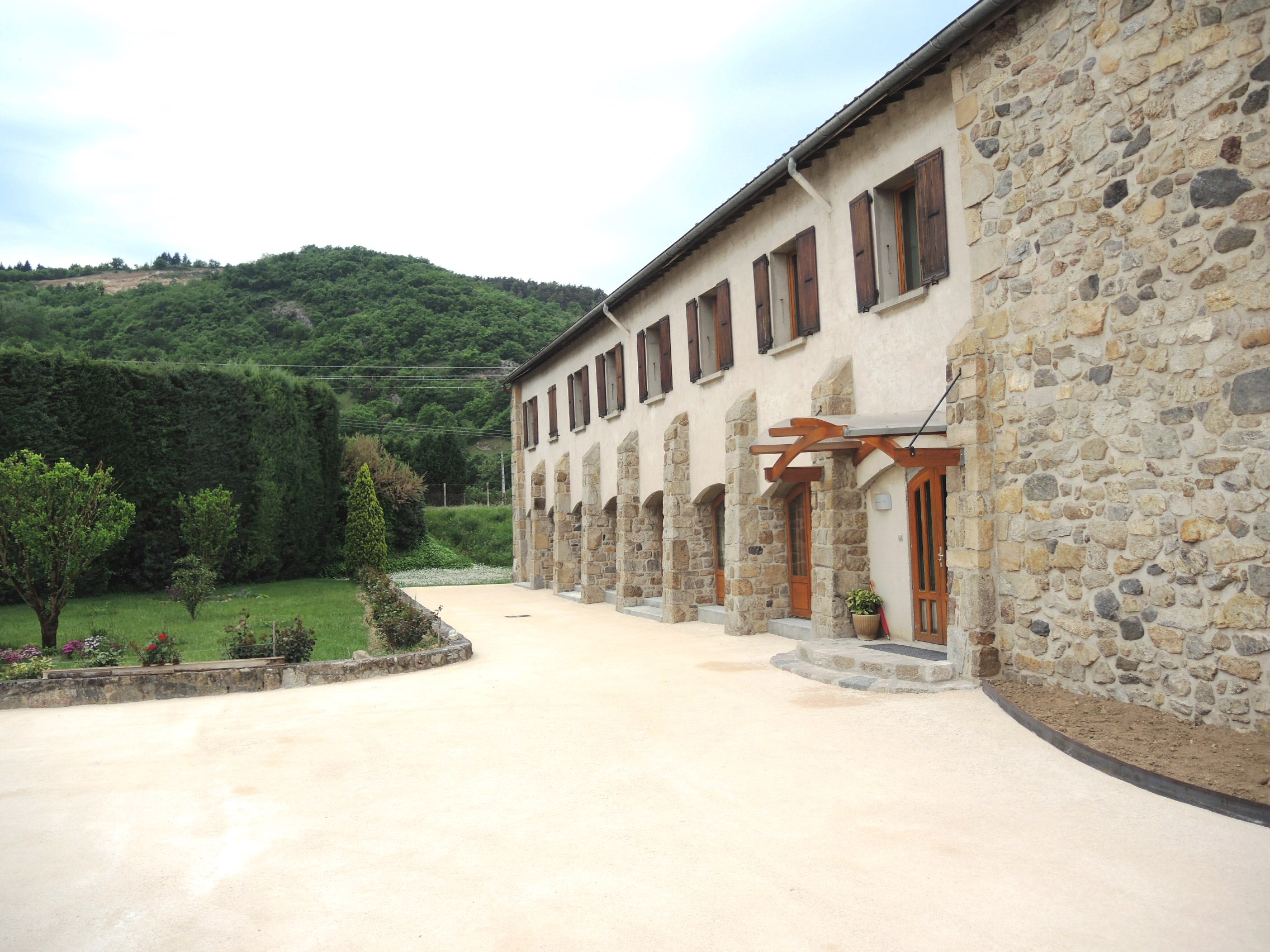 Champagne (Ardèche) détail